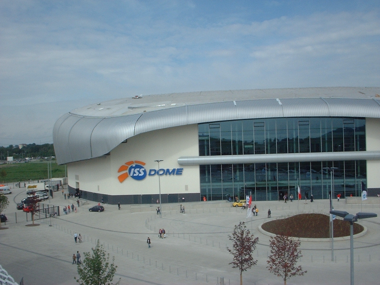 ISS-Dome in Düsseldorf-Rath Eröffnung